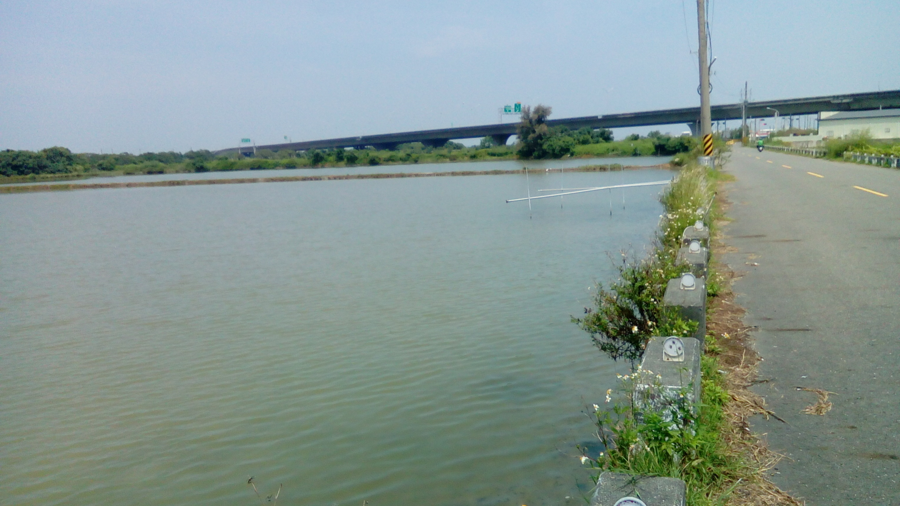 近台84線